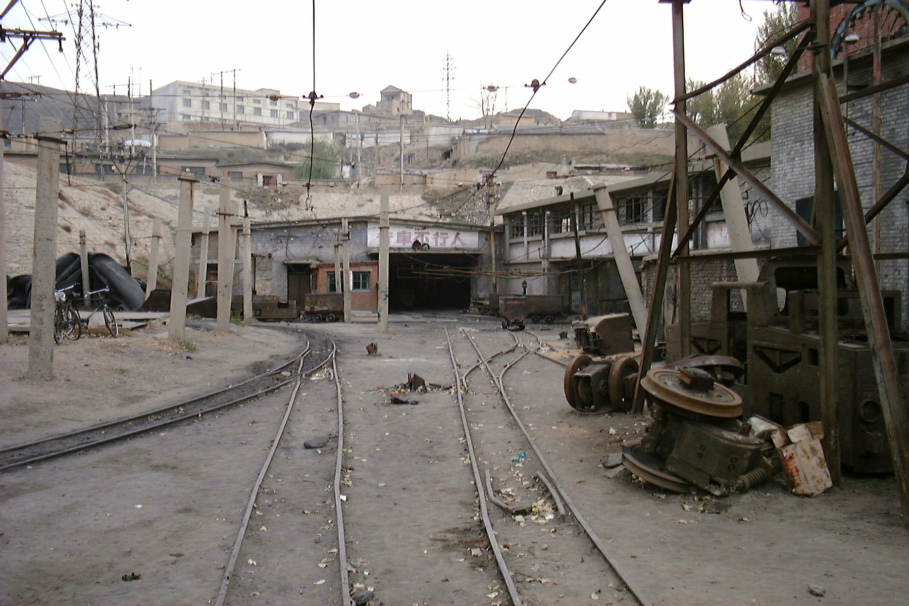 Jin Hua Gong Mine, Datong, Shanxi, China